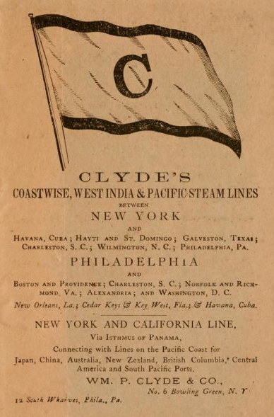 Advertisement